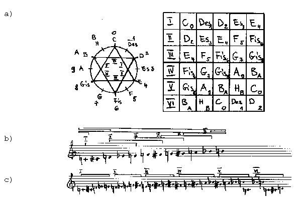 Kaksteisthelirea (näide 1.1) rotatsioon; roteeruva segmendi pikkus on viis rea elementi, rotatsiooni samm on kaks elementi: a) geomeetrilise objekti rotatsiooni idee kohaldamine muusikas, b) rotatsioon noodikirjas, c) rotatsiooni tulemusena saadud rida. Rooma numbriga on tähistatud rotatsioonisegmenti